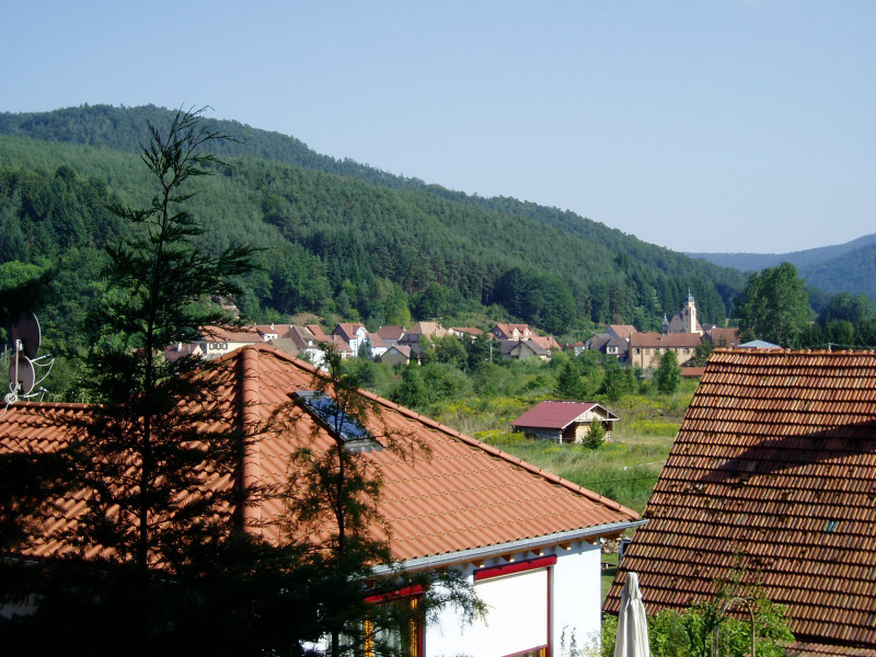 vue de Philippsbourg